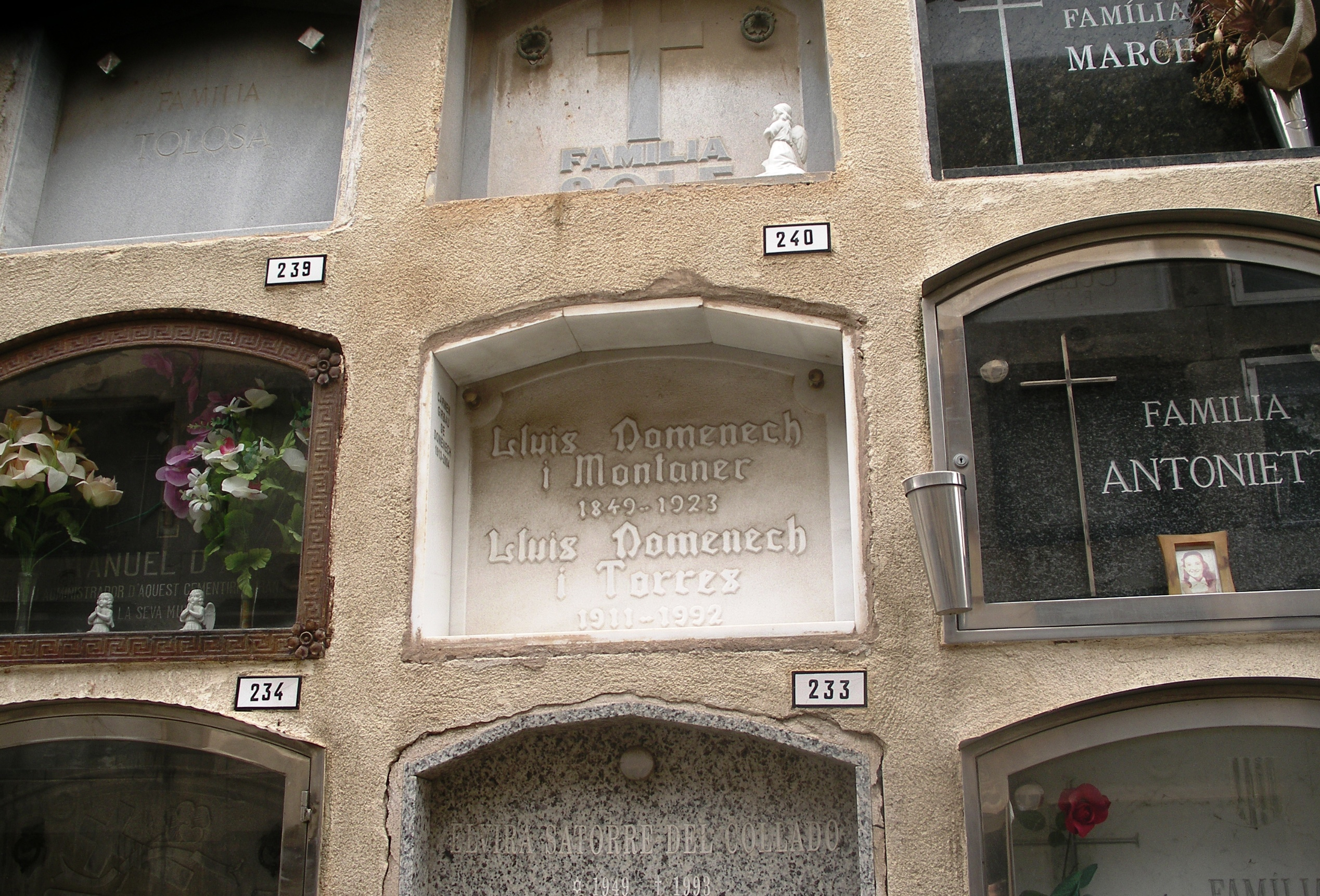 Tomba de Lluís Domènech i Montaner al Cementiri de Sant Gervasi (Barcelona)